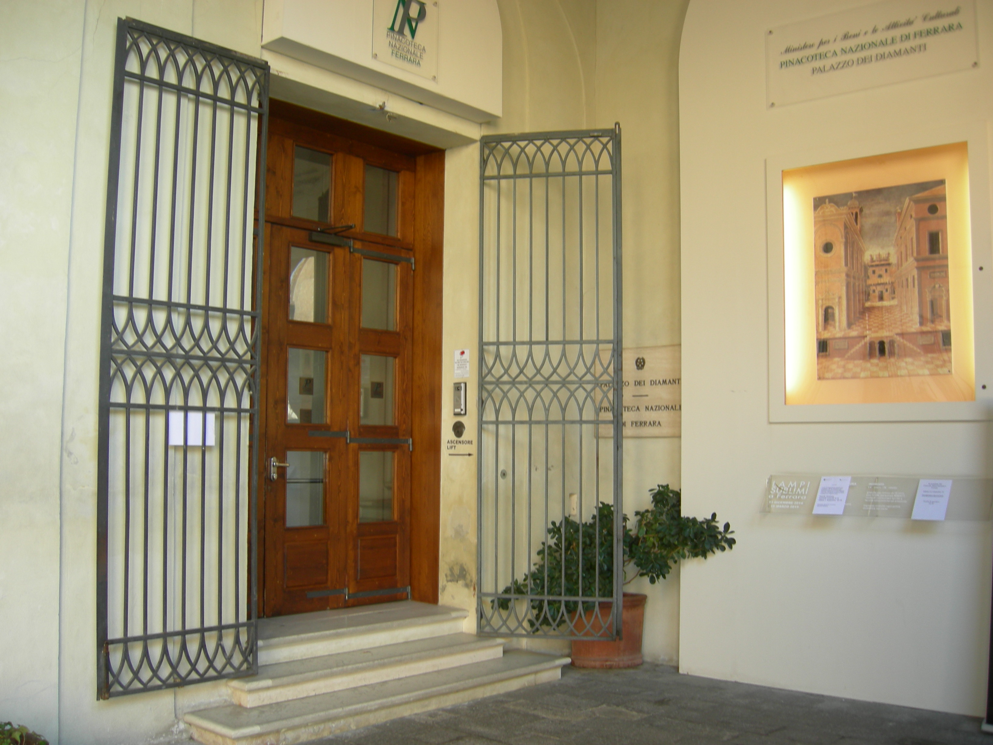 Ingresso Pinacoteca Nazionale, palazzo dei Diamanti, Ferrara